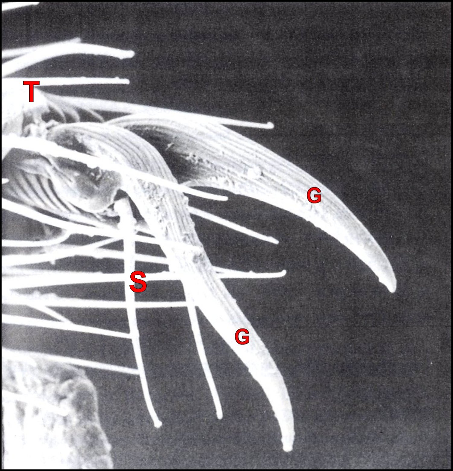 Autres griffes d' Arachnocoris karukerae (Guadeloupe) vues au microscope électronique à balayage